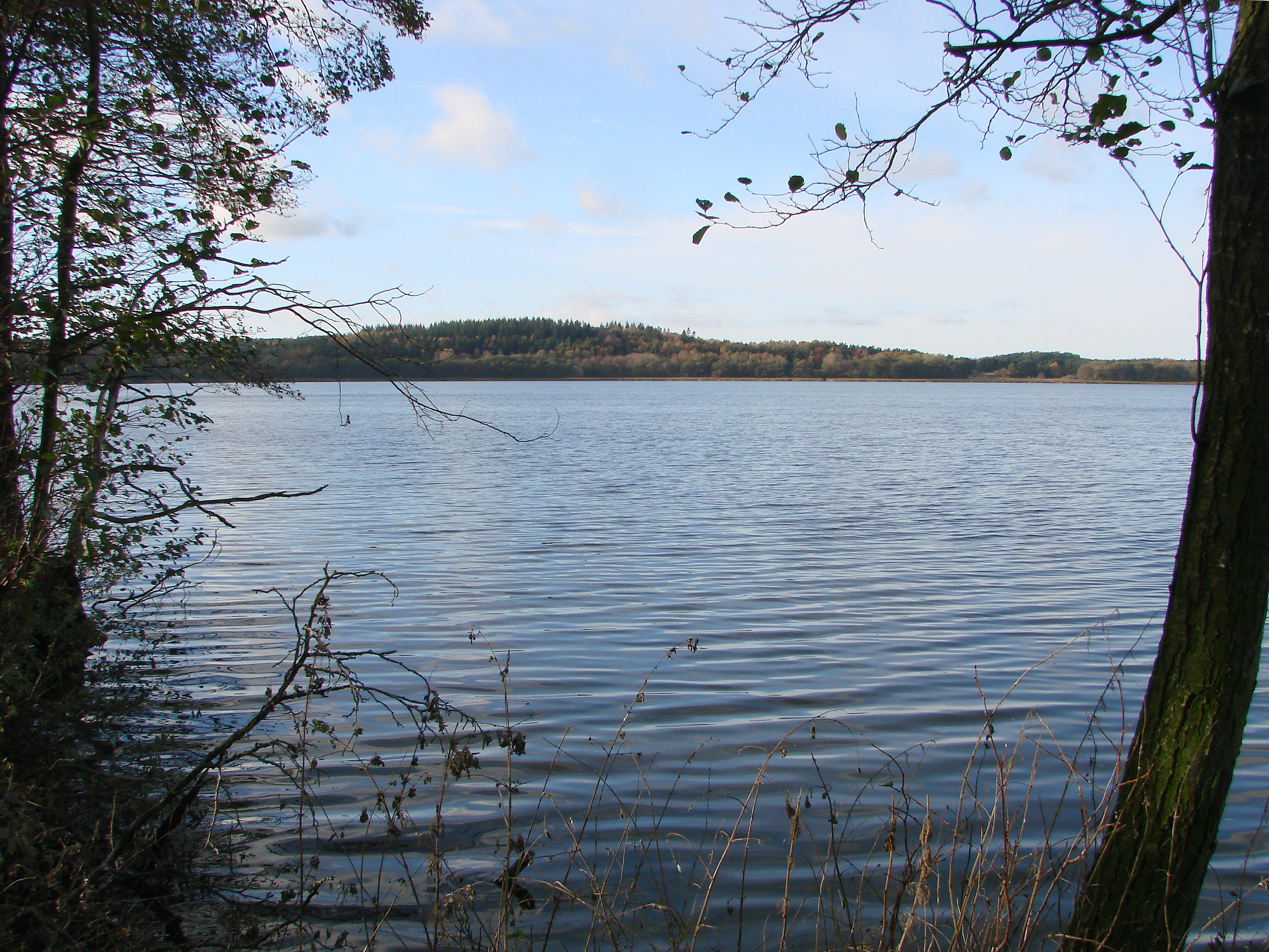 Stubbe Sø set fra sydbredden